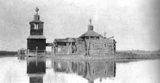 Паводок на Колыме.Церковь села Нижнеколымск во время паводка